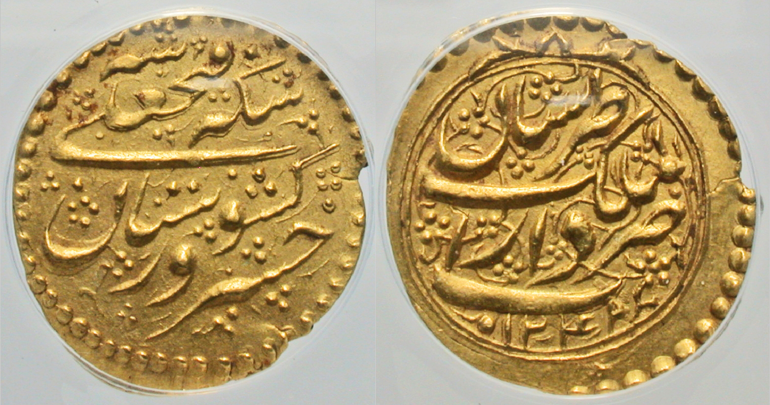 عبارت خسرو کشور سِتان (فاتح کشور) اشاره به واقعه جنگهای بین ایران و روسیه دارد